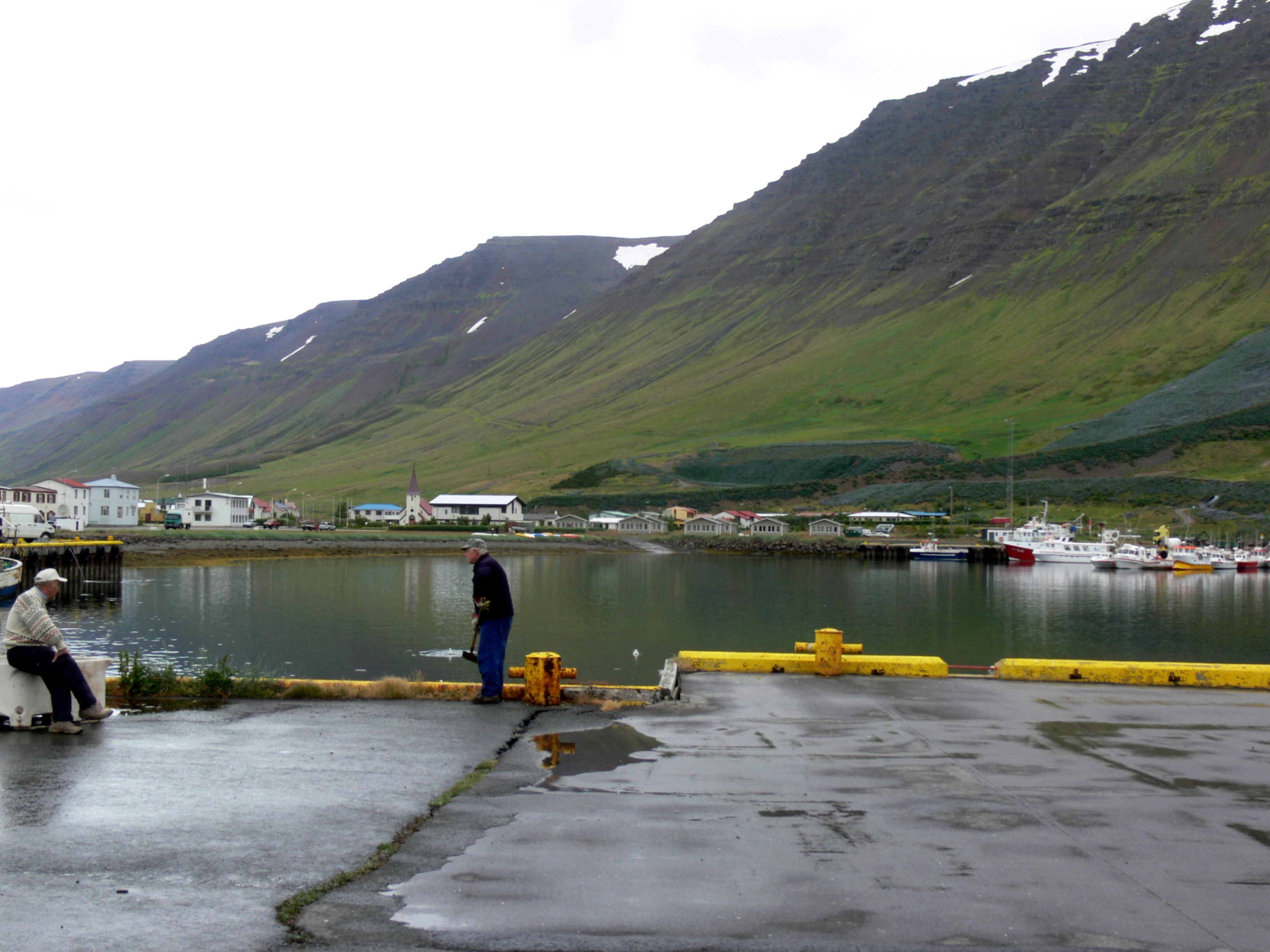 Hafen von Flateyri.